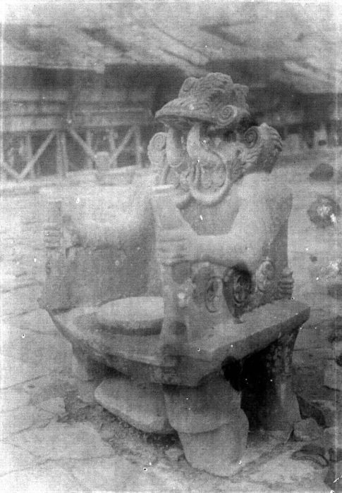 Negatief. Stenen zetel te Hilisimaètano